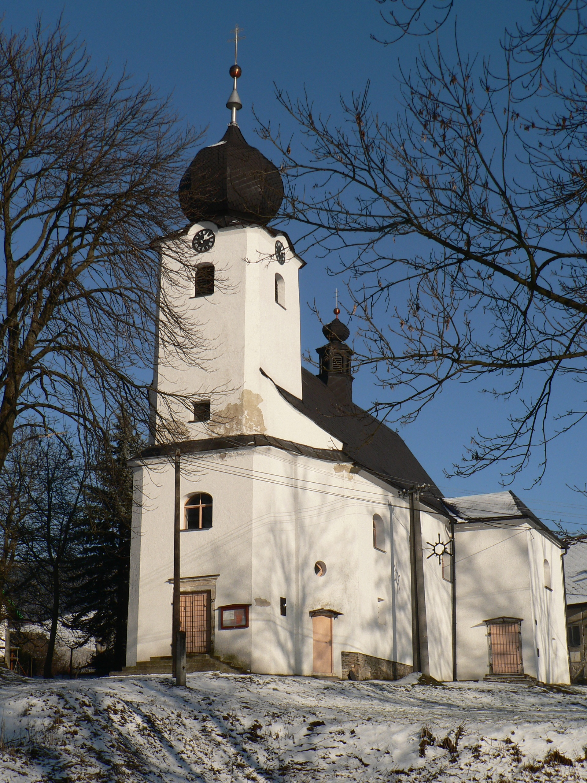 Kostel svatého Matouše (Vernířovice)